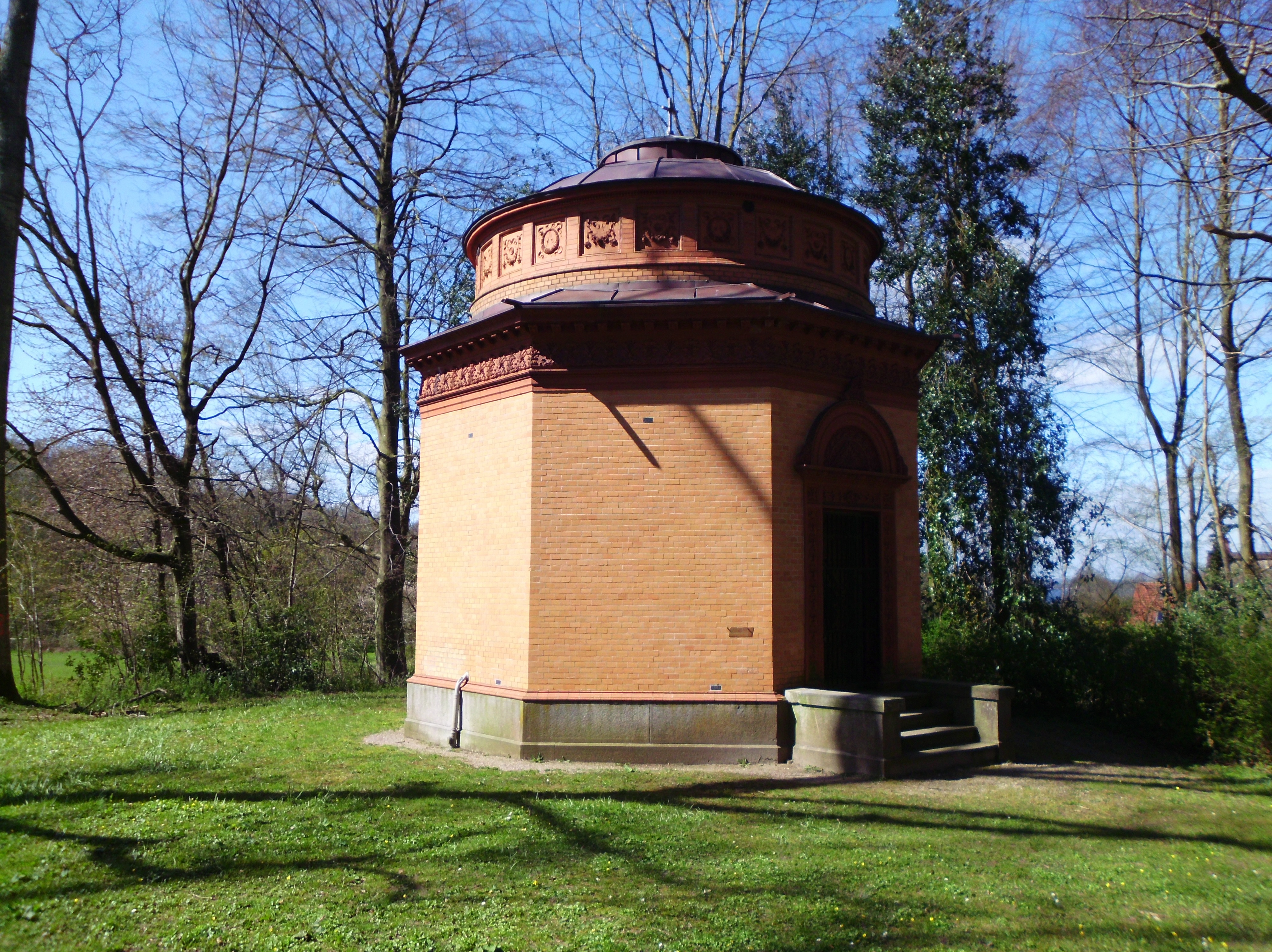 Mausoleum des Prinzen v.S-H-Augustenburg Graf v.Noer. Gut Noer.